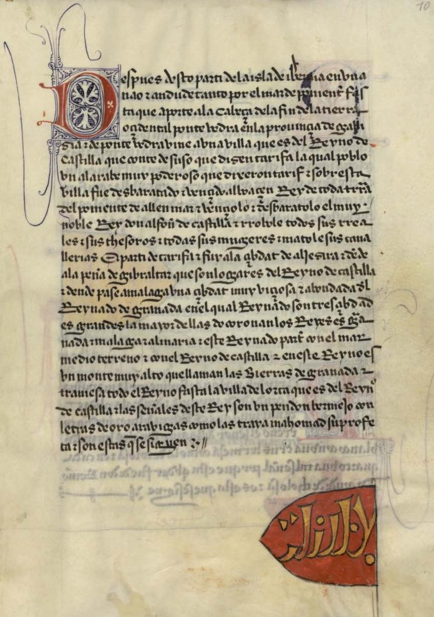 Libro del conocimiento ms. S f. 10r